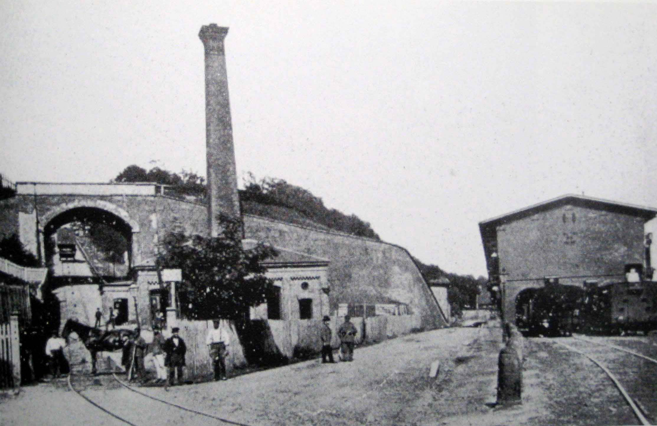 Daguerreotypie von der Standseilbahn Altona Kai, ca. 1849